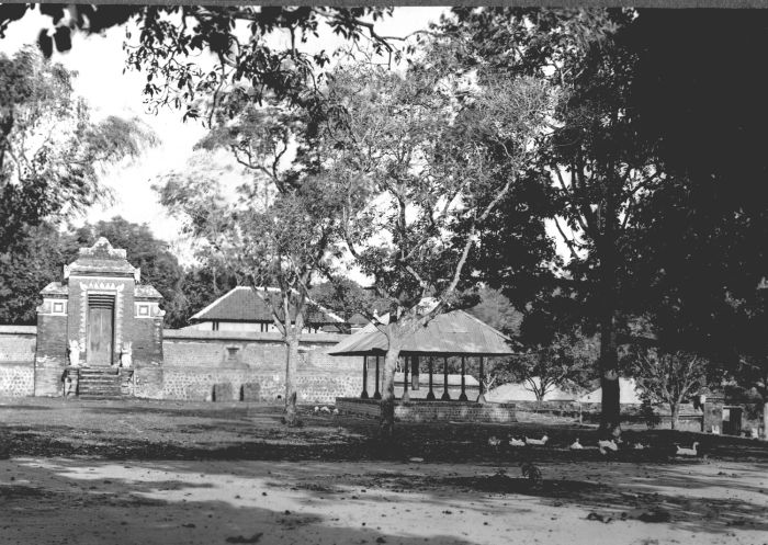 Foto. Herinnering aan het bezoek van Z.E. den Gouverneur Generaal Mr. D. Fock aan Lombok 6/8 April 1925. De Poera Zinsar